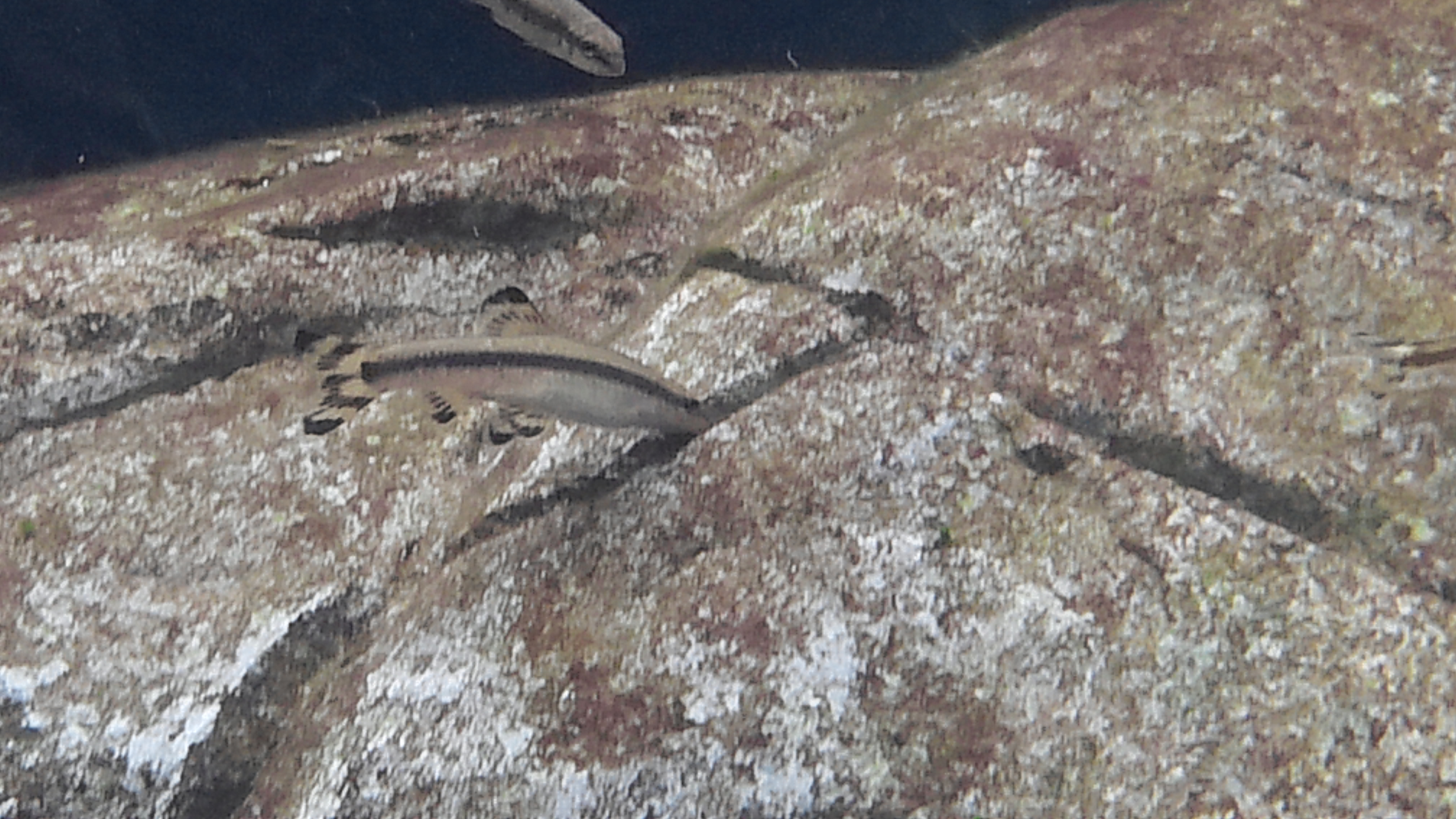 감돌고기(Pseudopungtungia nigra)